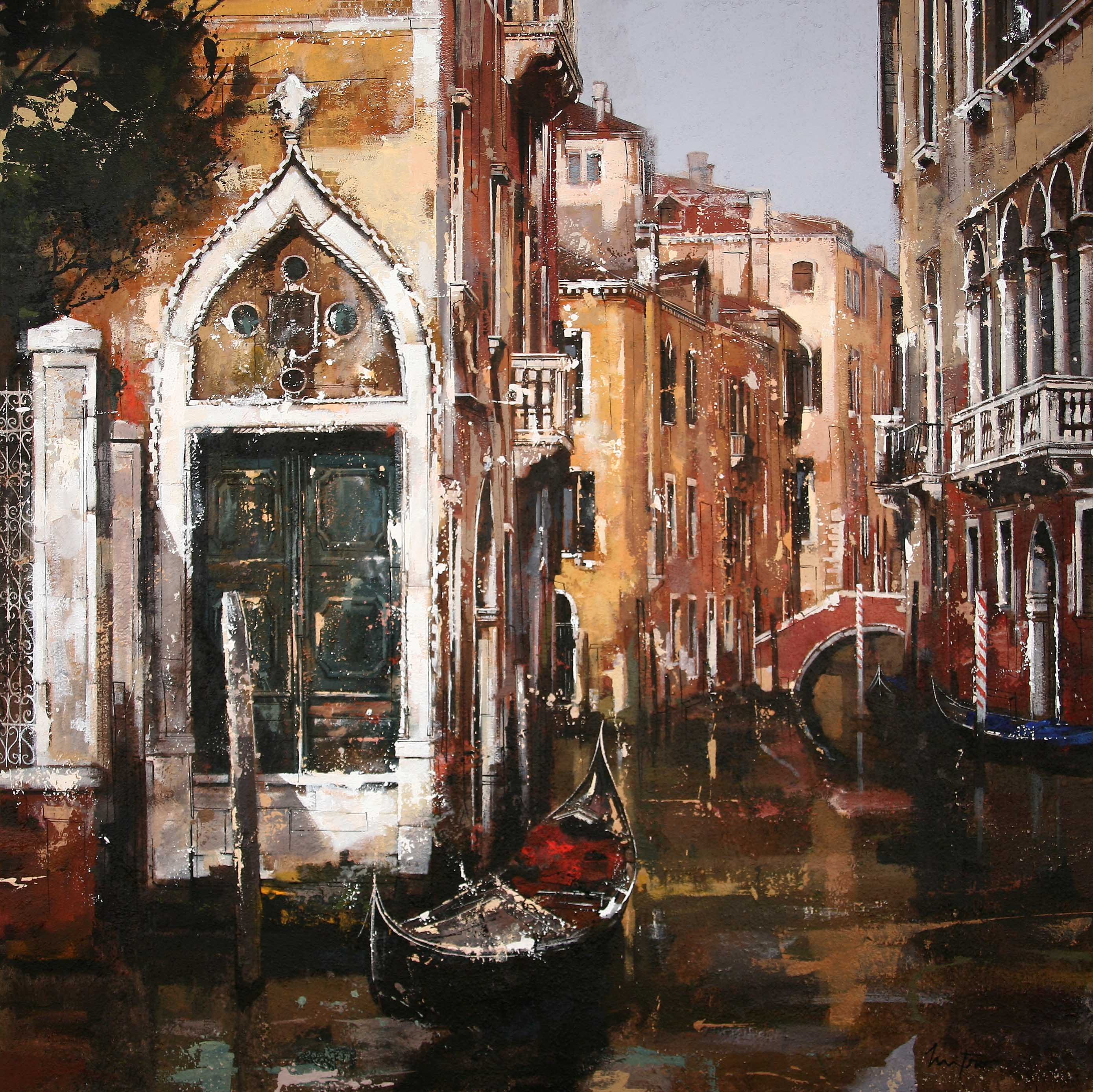 peinture figurative - toute reproduction interdite - MITRO